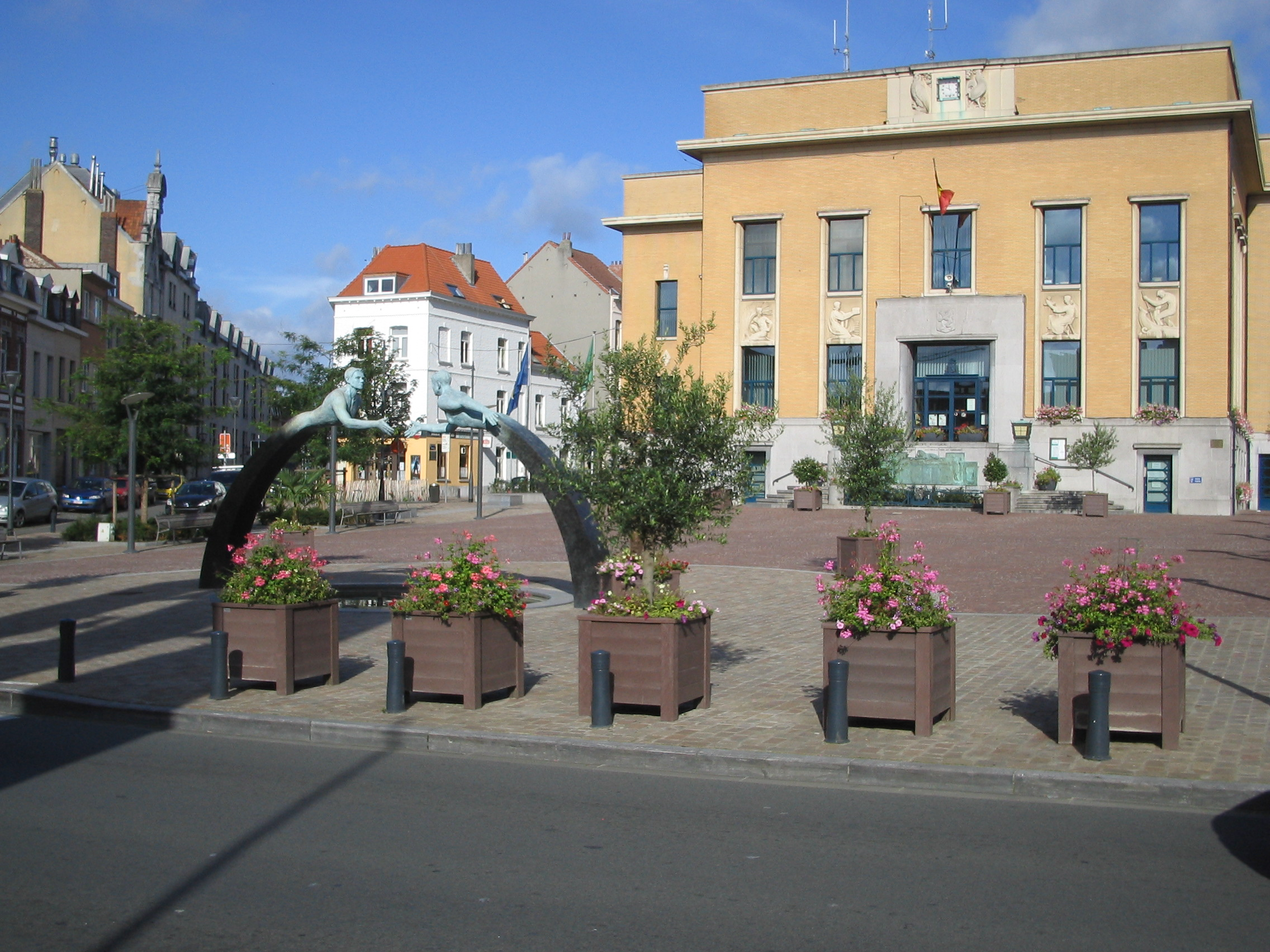 Maison communale de Koekelberg. Place Henri Vanhuffel.